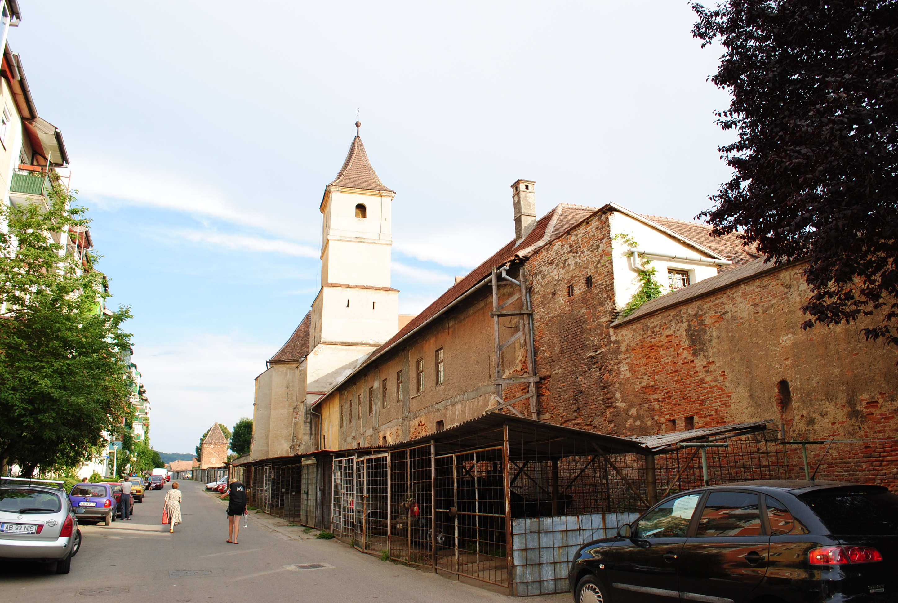 Ansamblul fortificațiilor orașului medieval, sec. XV - XVII